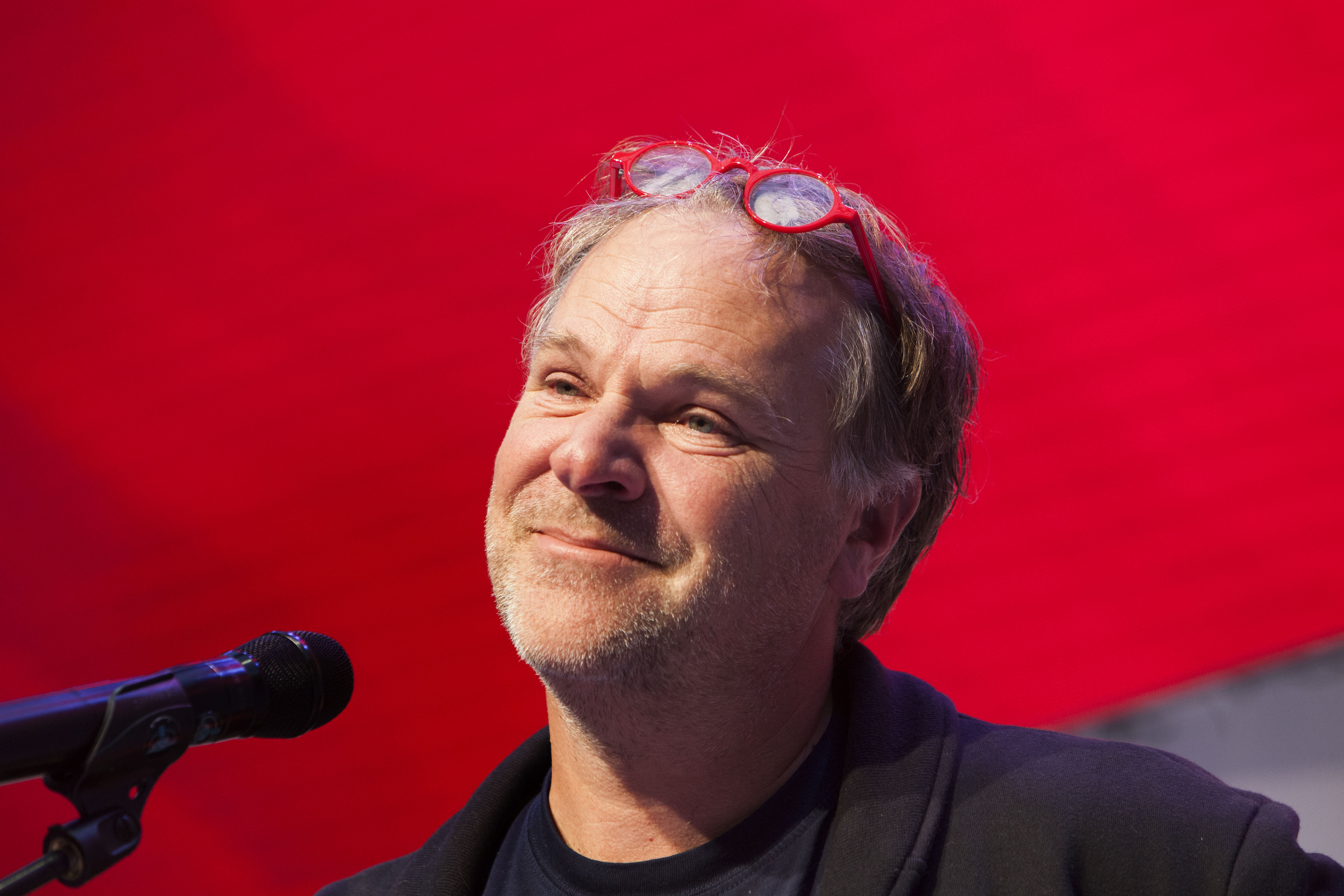 DE BEELDREDAKTIE / MAARTEN HARTMAN T.B.V. DE PVDA NIEUWEGEIN D.D. 07.10.2017 Sfeerbeelden van het PVDA-Congres